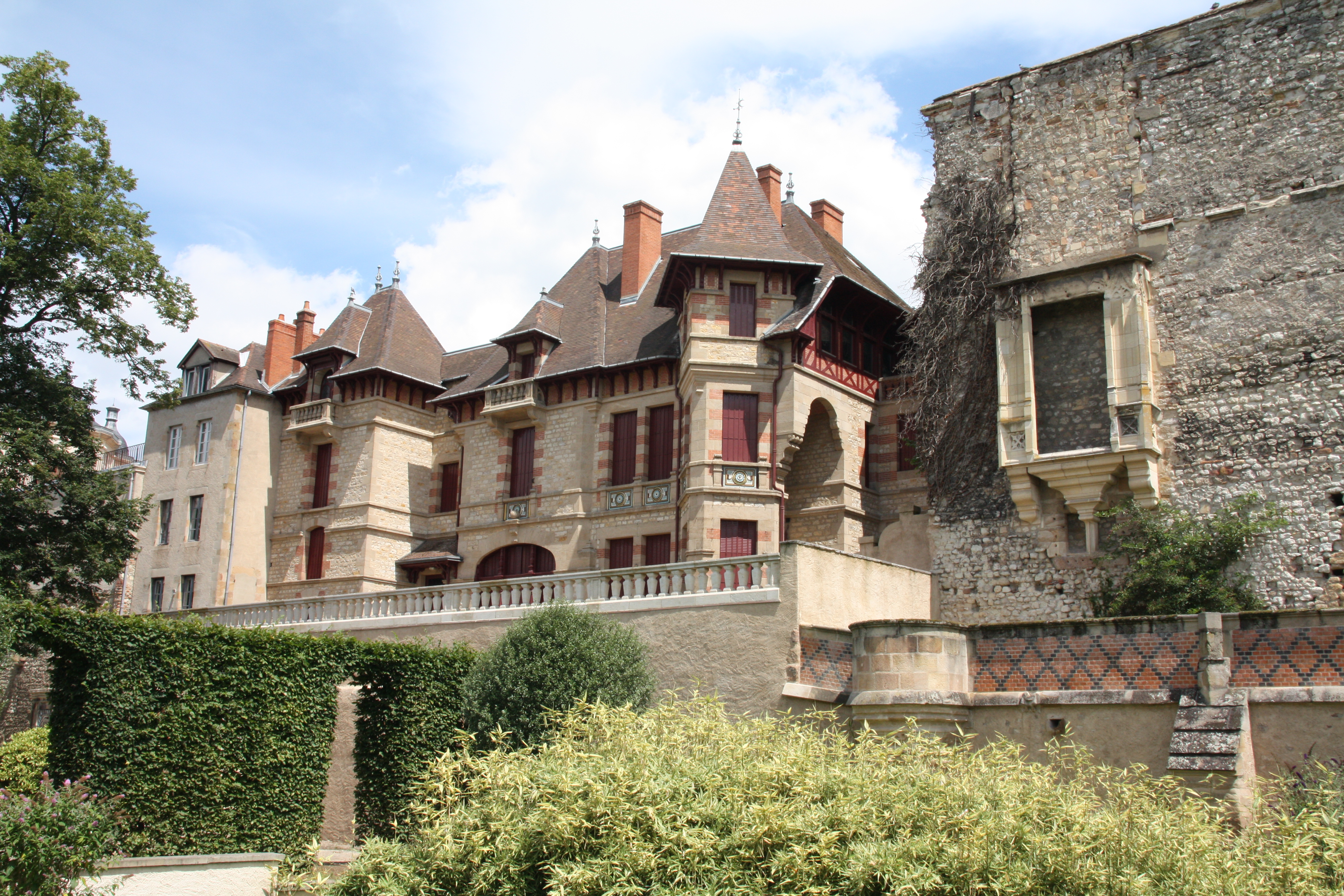 Moulins, France. Maison Mantin, façade arrière.